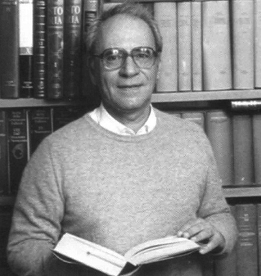 Franco Della Peruta